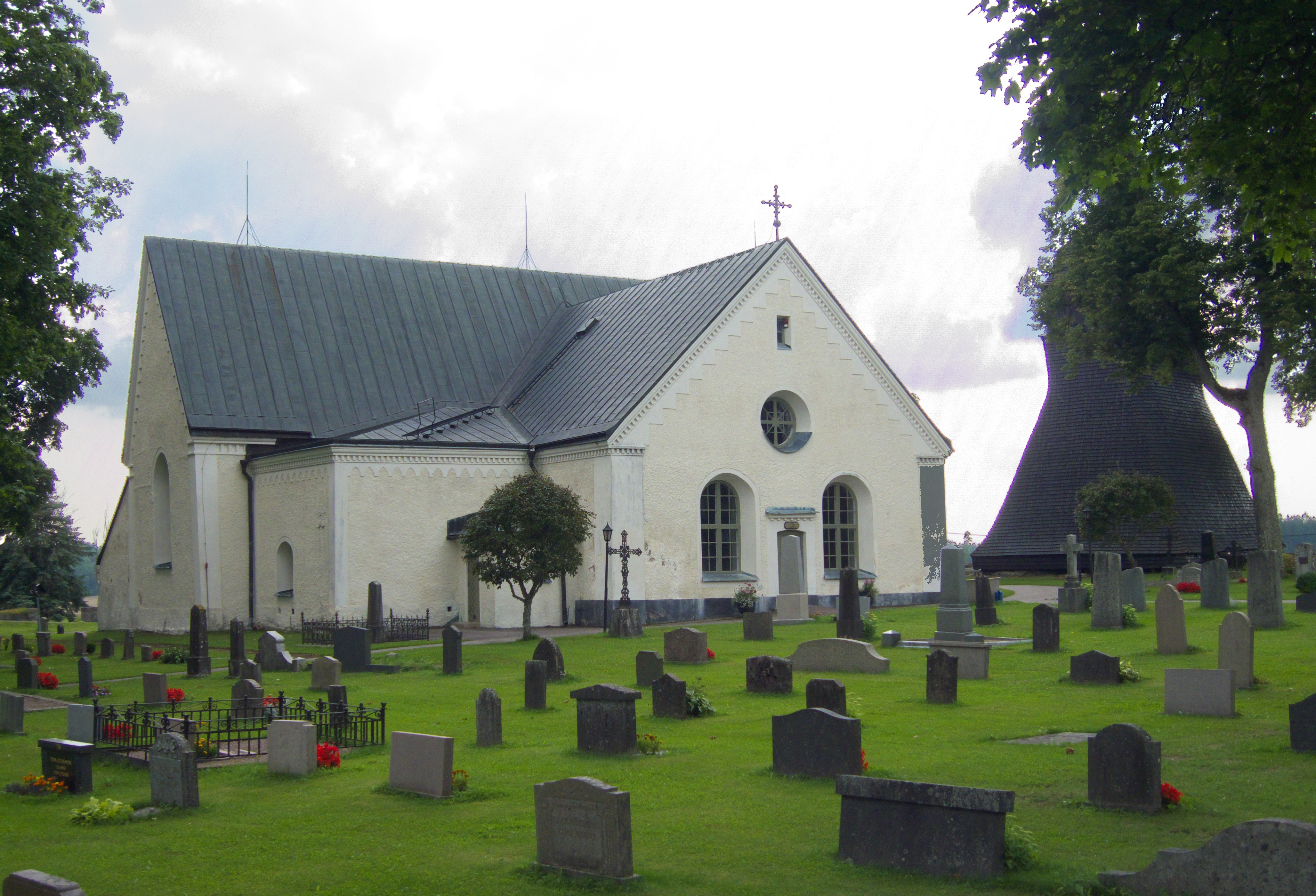 Vittinge kyrka